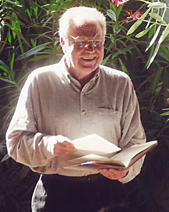 Theodor Daniel Altmeyer